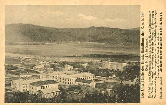 koszary 45 galicyjski regiment piechoty